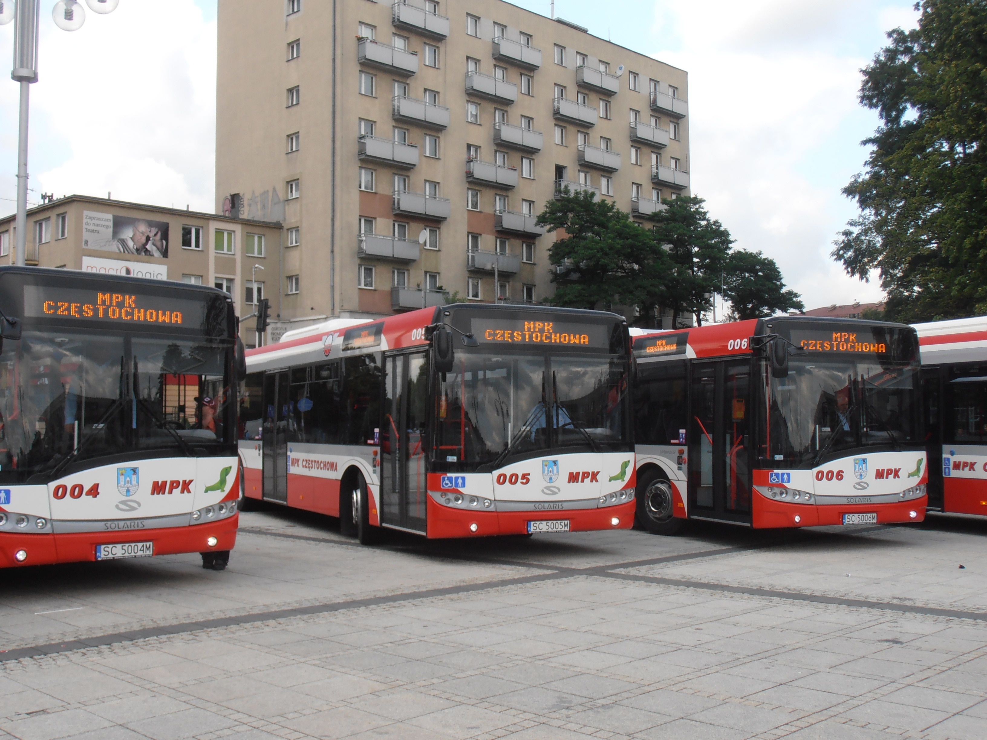 Solaris Urbino 12, Plac Biegańskiego, Częstochowa, prezentacja